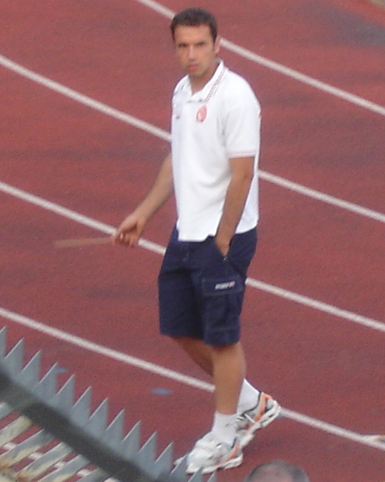 Sorin Paraschiv durante un prepartita del Rimini Calcio.